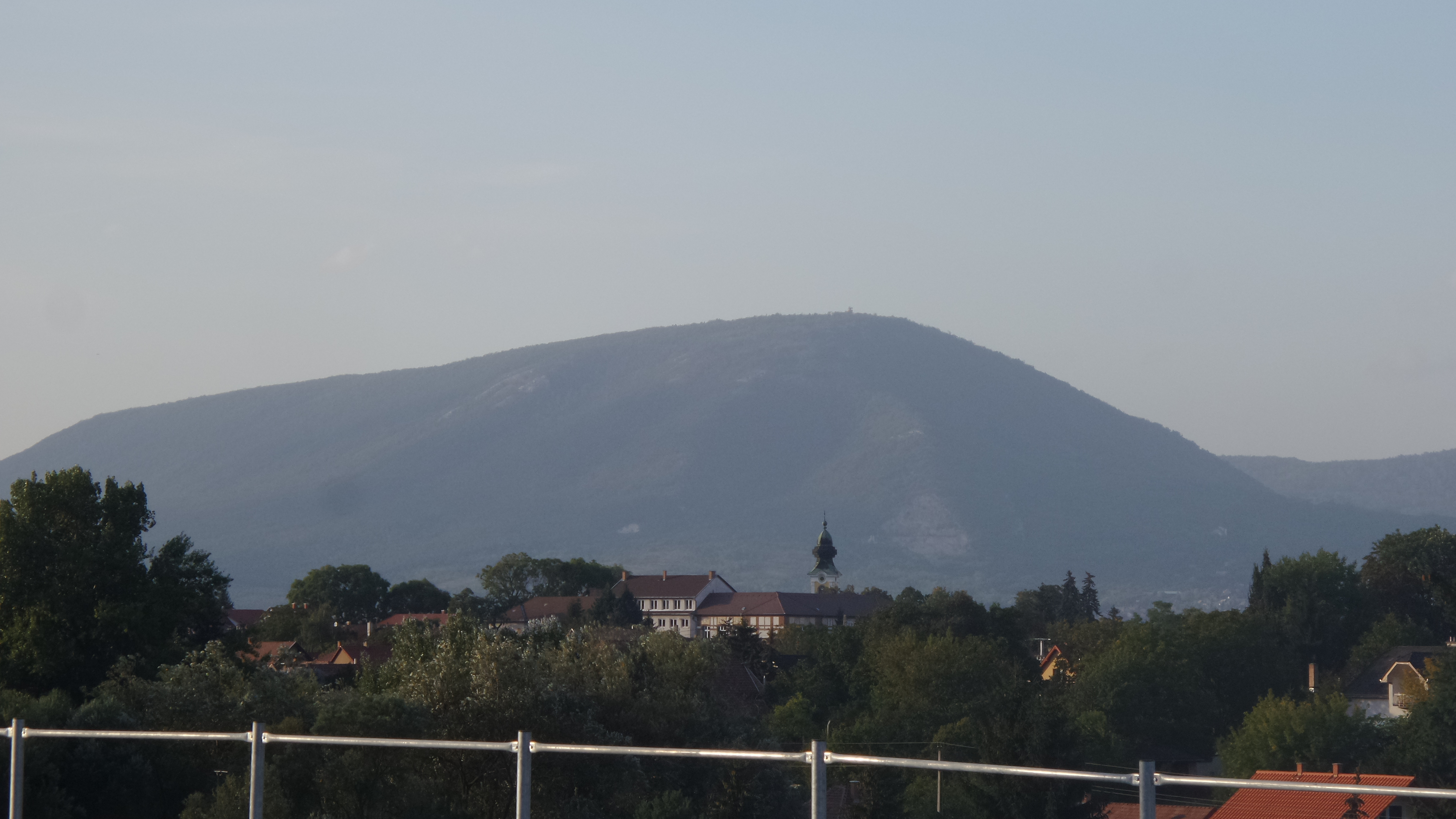 A Pilis látképe a megállóhelyről